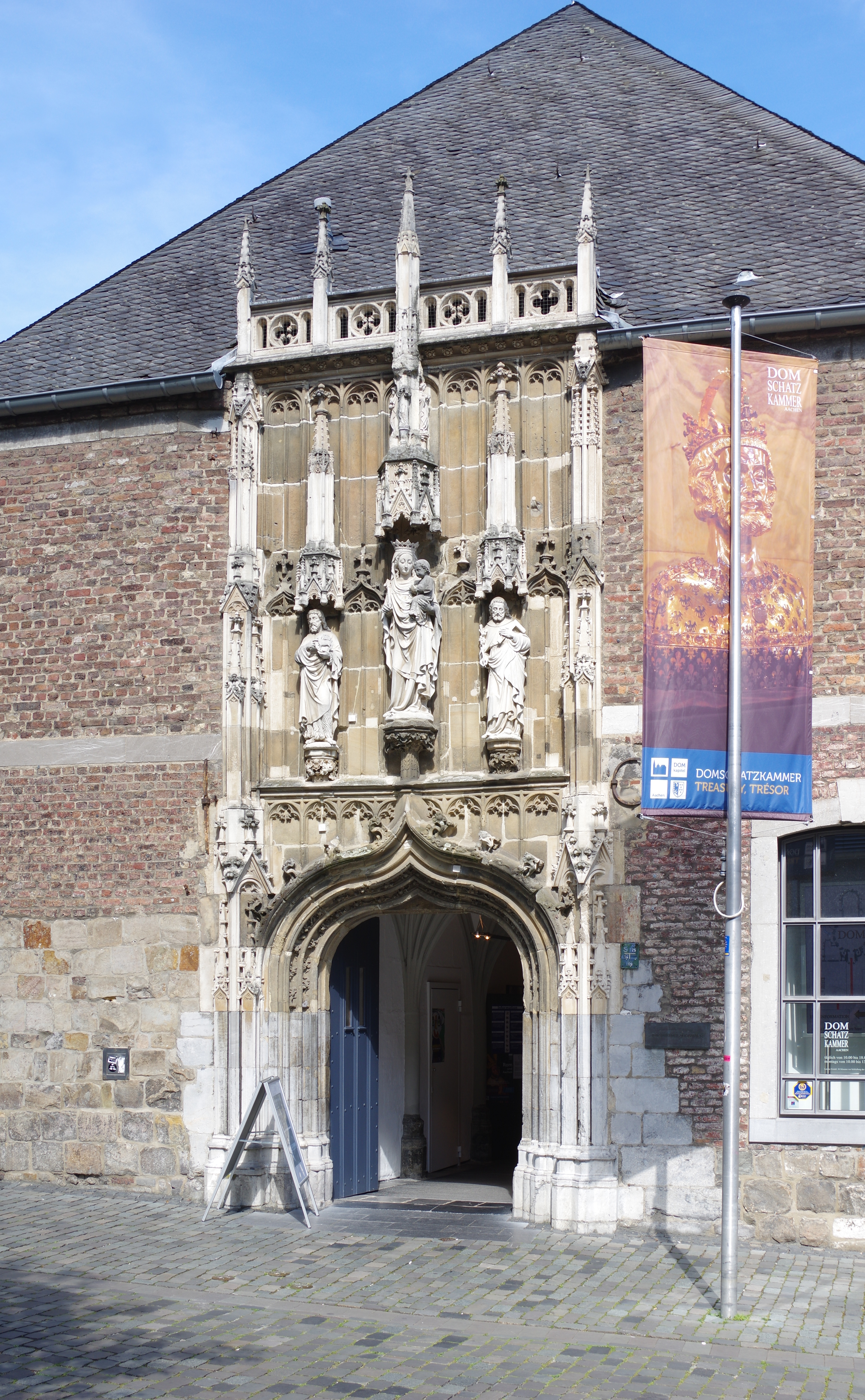 Aachen, Eingang zur Domschatzkammer